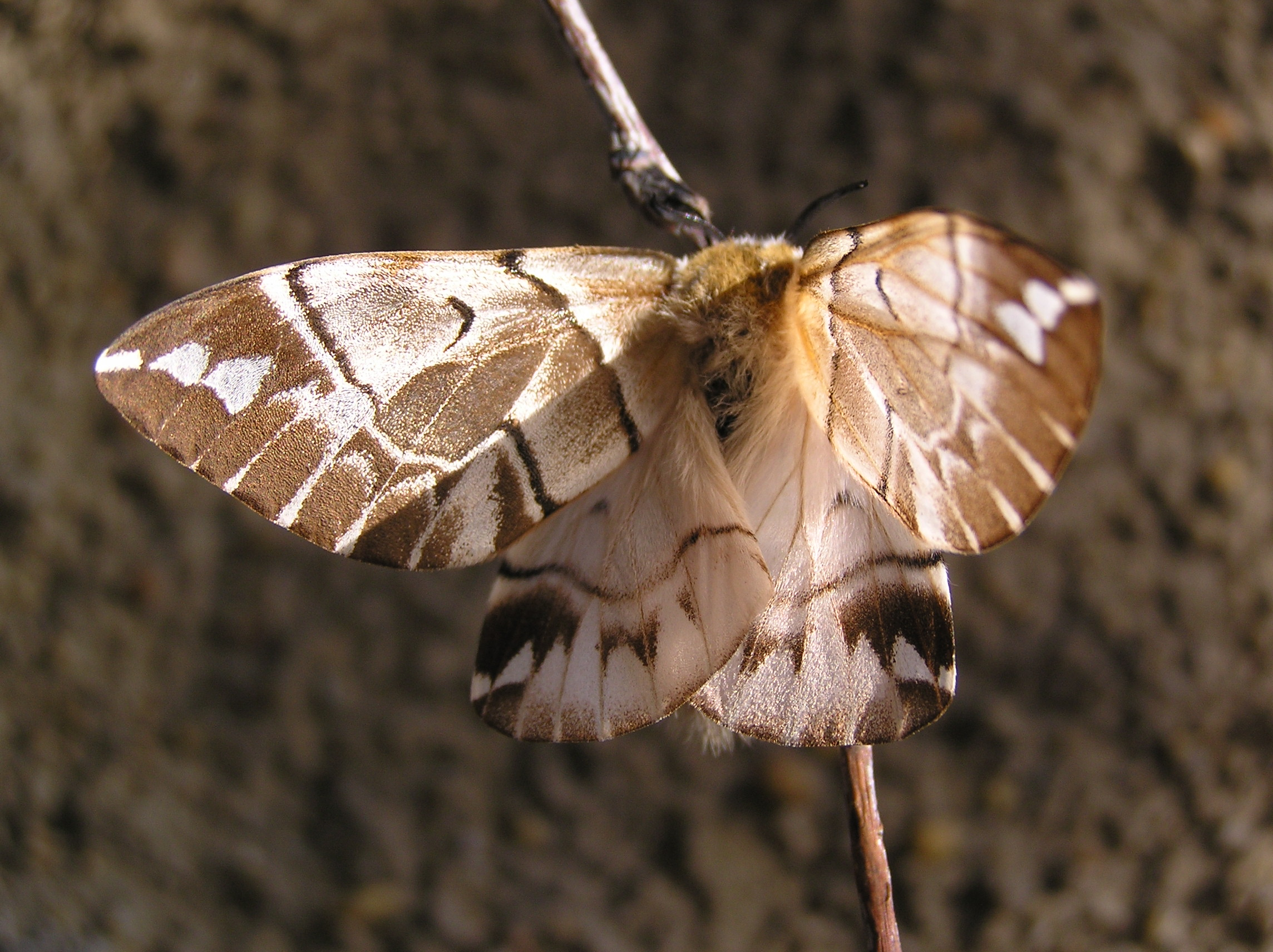 Beschreibung: Birkenspinner Quelle: Bild selbst erstellt Datum: 13. April 2007 Autor: Severine Meißner